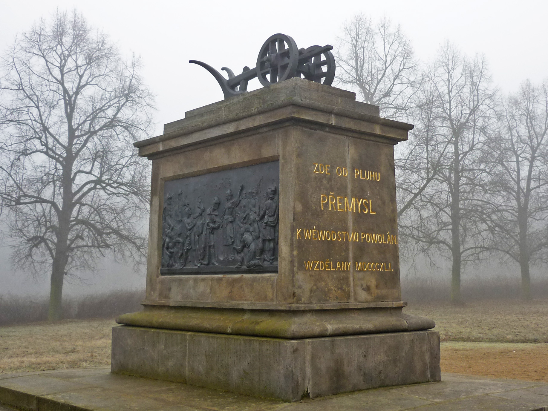 Denkmal Přemysl der Pflüger bei Stadice, Okres Ústí nad Labem